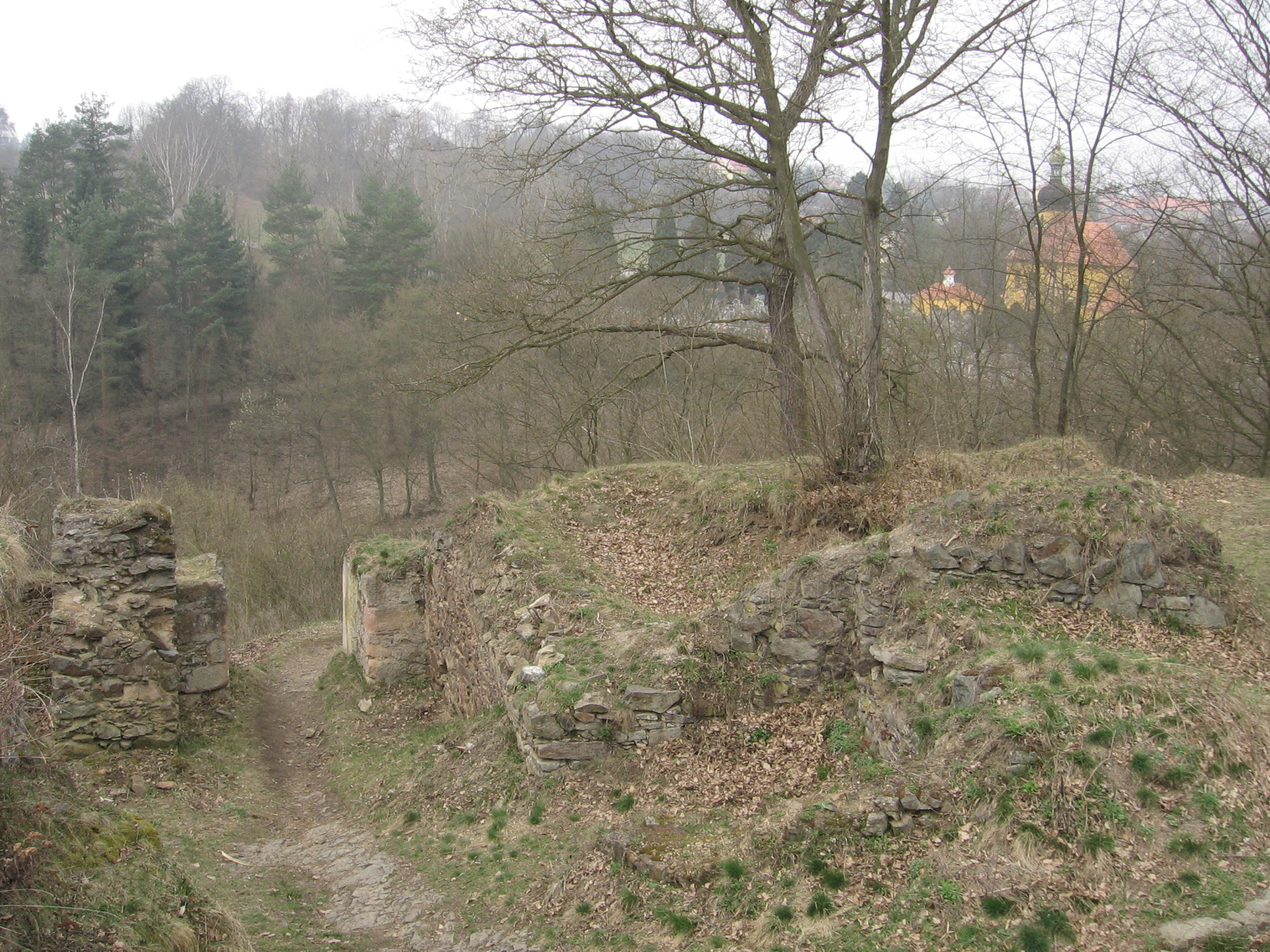 Hrad Věžka, v pozadí kostel sv. Máří magdaleny v Druztové, okr. Plzeň-sever